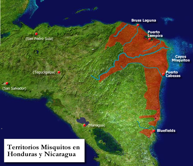 Extensión Cultura Misquita Honduras y Nicaragua